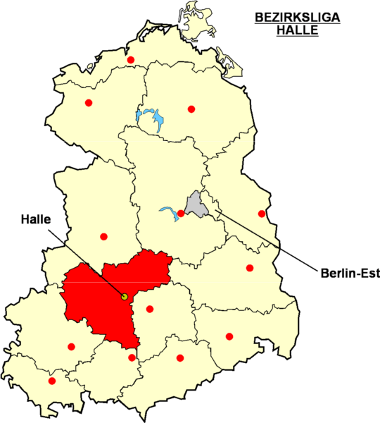 Localisation de Halle dans la "Bezirksliga Halle" Catégorie:Logo de clubs de football - Allemagne